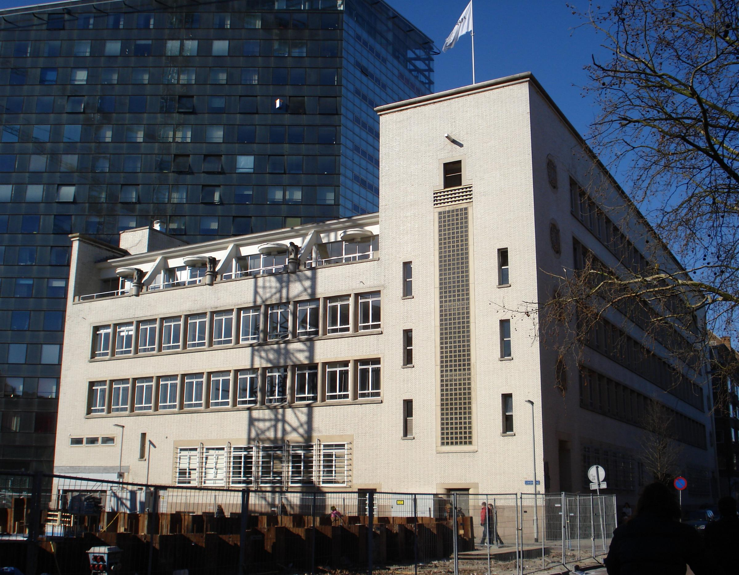 Rotterdam, Botersloot 25. Gemeentemonument.